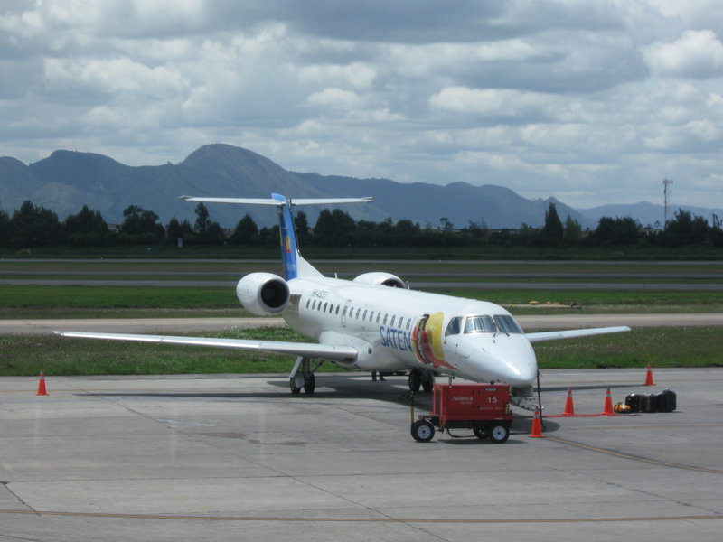 SATENA